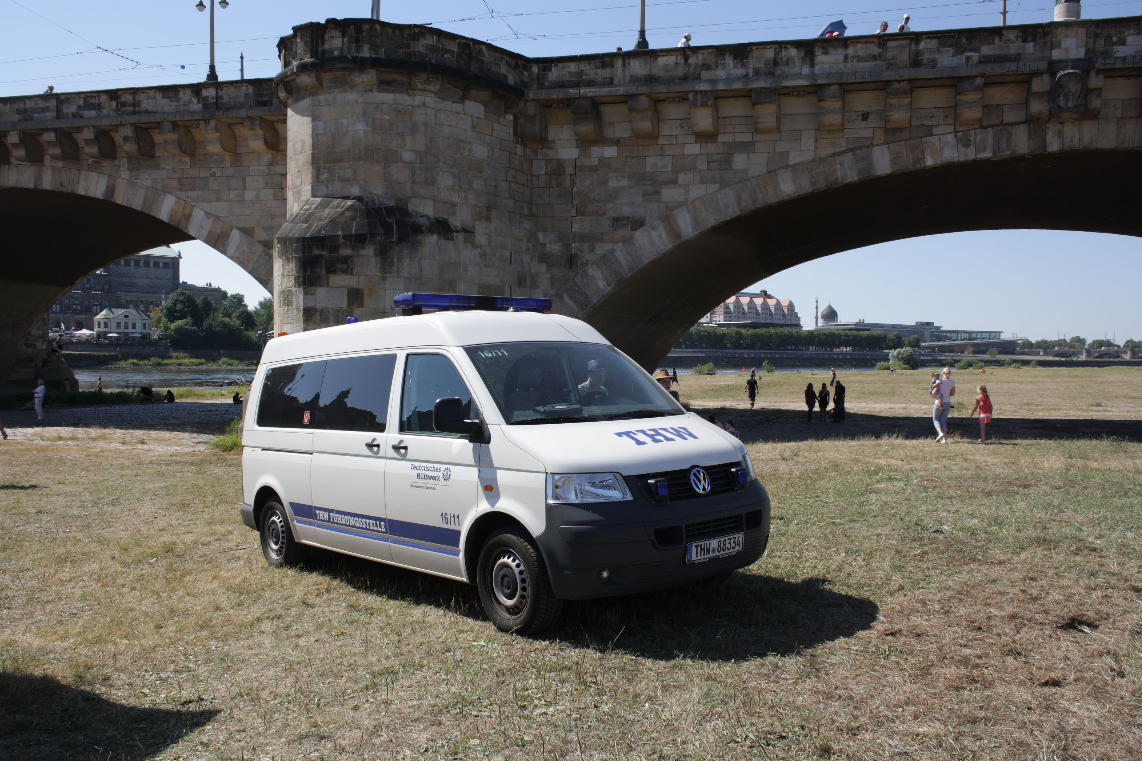 Führungskraftwagen (VW Transporter T5) der Fachgruppe Führung und Kommunikation des Technischen Hilfswerk